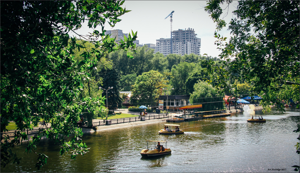 міський ставок у парку глоби